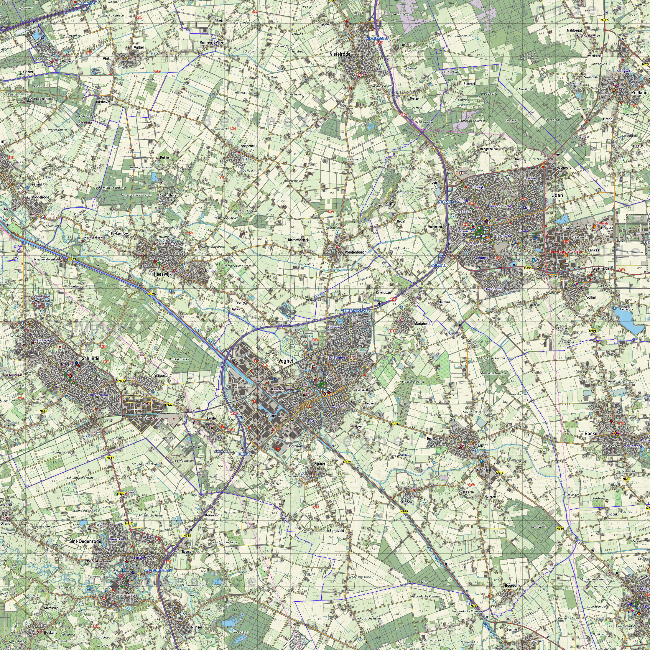 Topografische kaart van de regio Uden-Veghel (2013). Op basis van de GML open geodata van de BRT/Top10NL (basisregistratie Topografie, Kadaster 2011), vrijgegeven door Kadaster onder de Creative Commons BY licentie. Additionele gegevens uit BAG en uit de Risicokaart. Samenstelling en kleurenschema: Jan-Willem van Aalst, met QuantumGIS en Photoshop. Zie ook de Legenda.